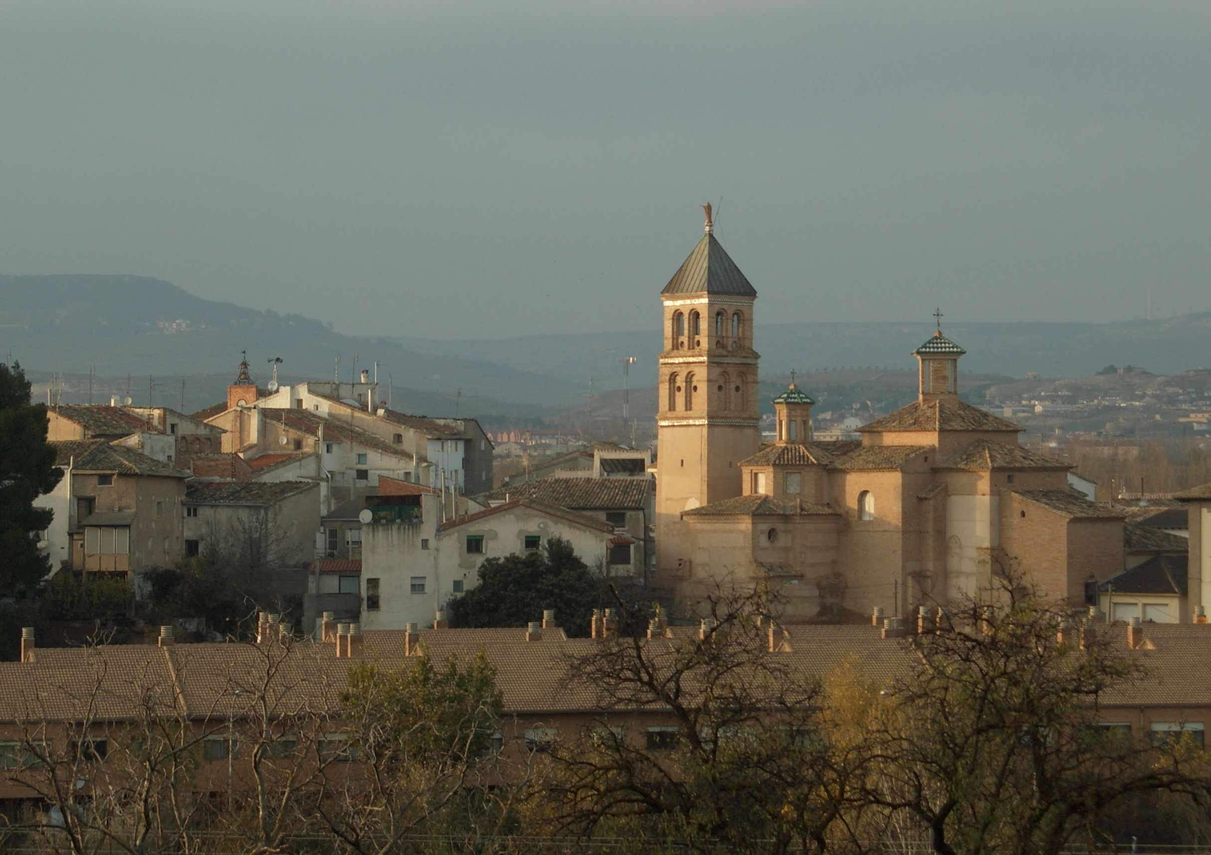 Ainzón